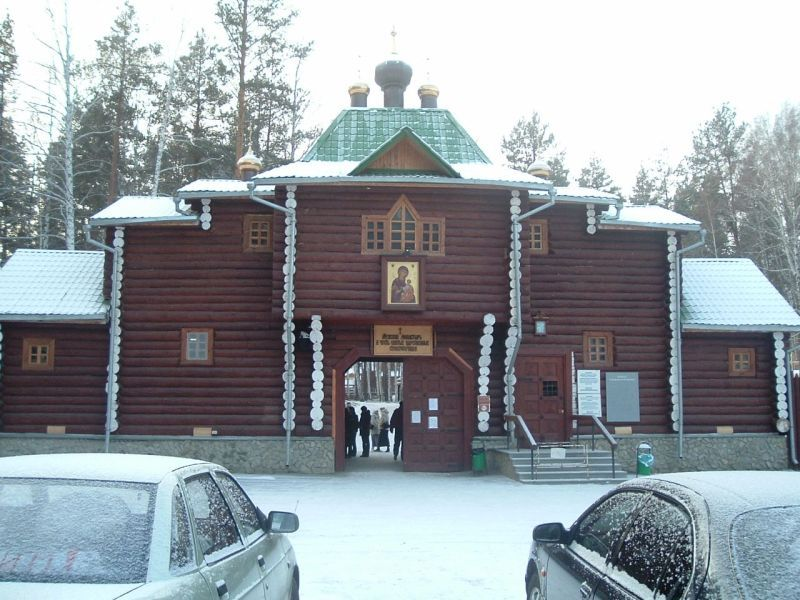 Eingang zum Kloster der "Heiligen Zarenmärtyrer" in Ganina Jama - bei Jekaterinburg / Russland